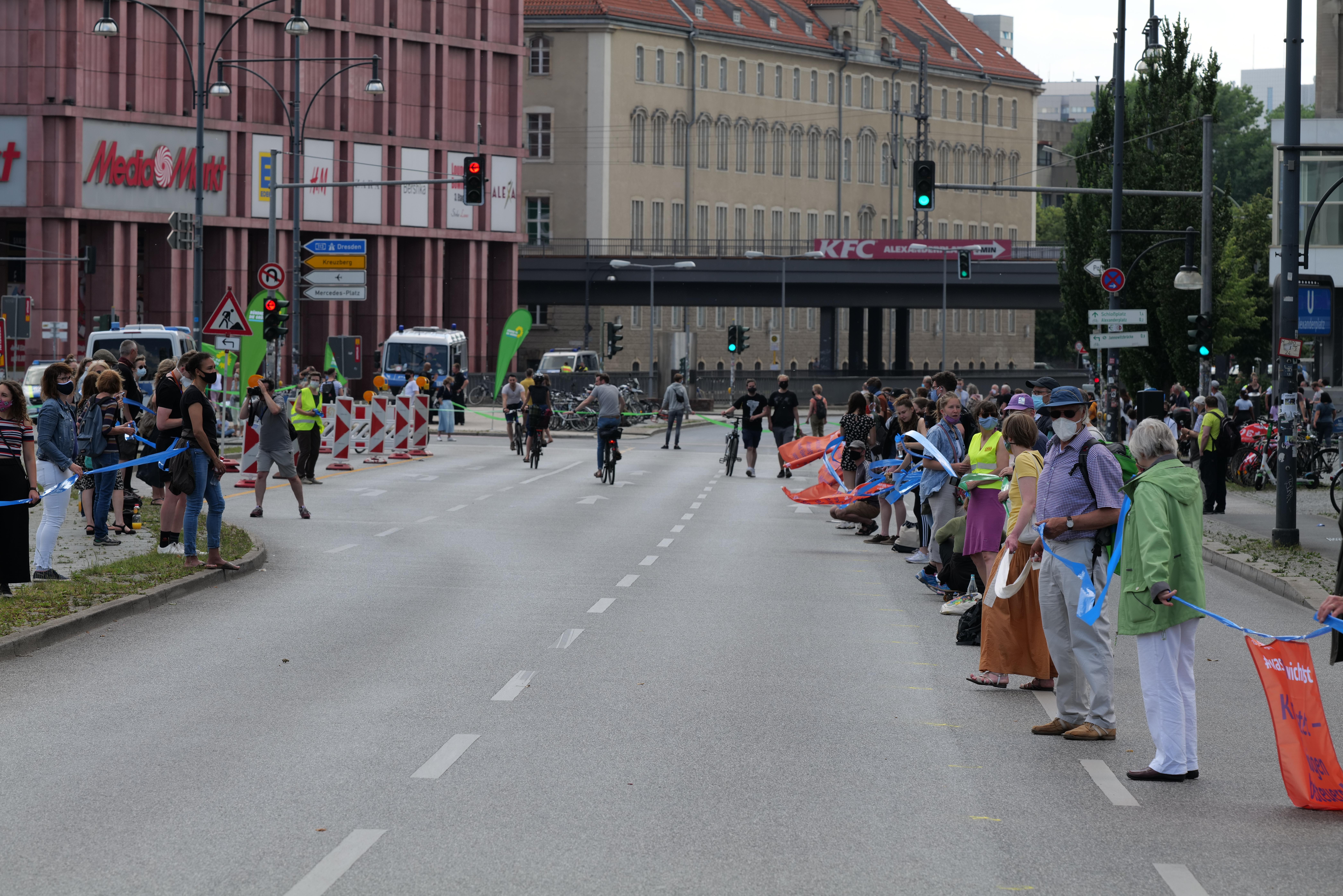 Menschenkette des Unteilbar Bündnisses für Solidarität vom Brandenburger Tor zum Hermannplatz in Berlin am 14. Juni 2020.